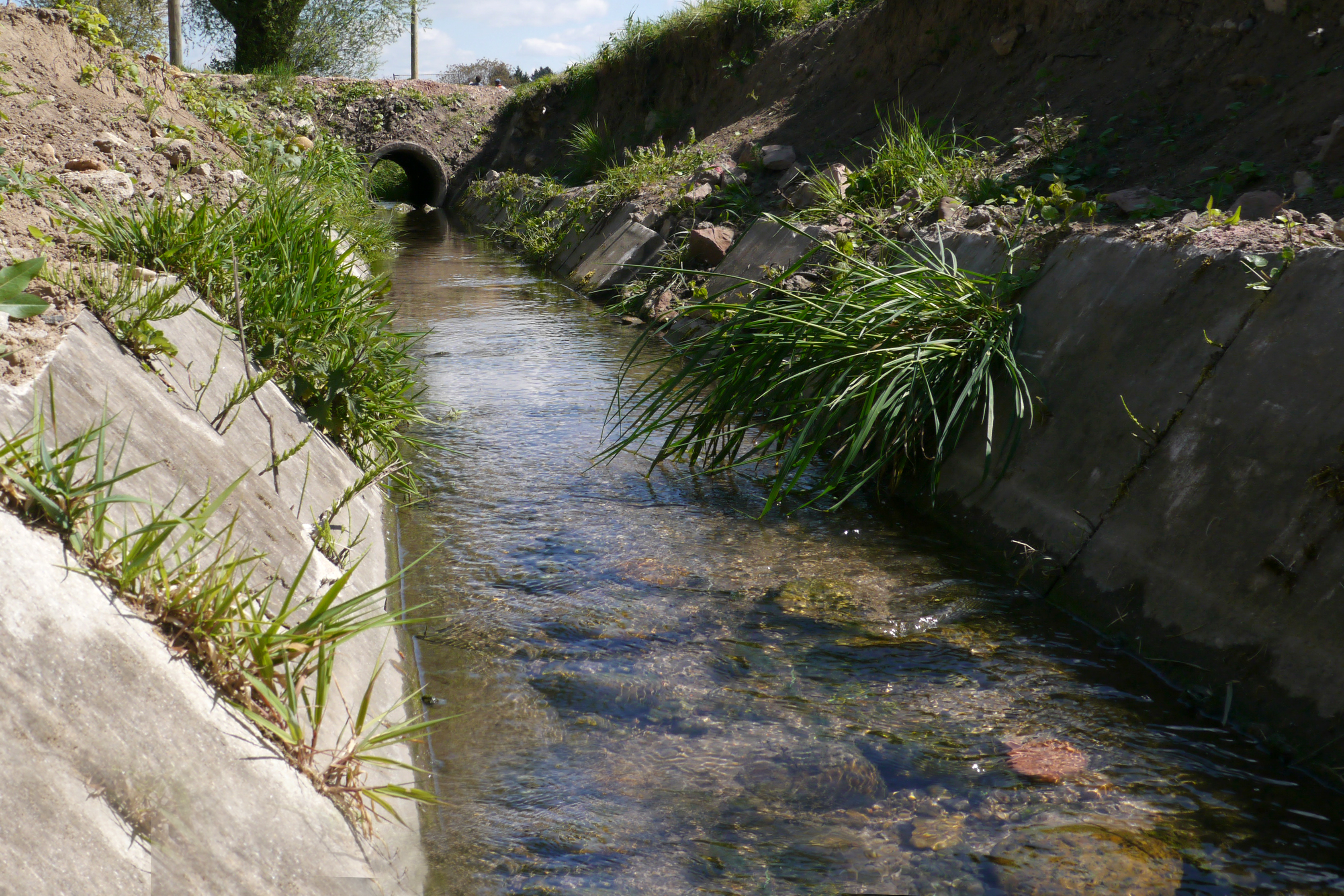 Ein Brückenübergang über den Gonsbach (Mainz) während der Renaturierung 2014 (zwischen Mainzer Straße und dem Rückhaltebecken Lungenberg). Die alten Betonhalbschalen sind noch zu erkennen (siehe zum Vergleich diese Stelle im Bild 2 Jahre später: Gonsbach bei Mainz 2016)